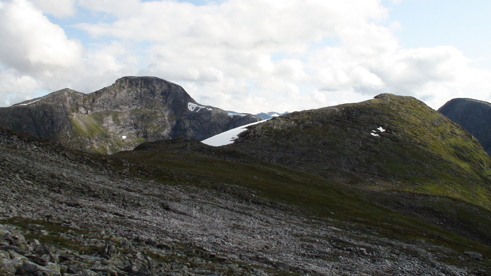 Holtefjellet og Mannefjellet sett frå Langerusthornet.